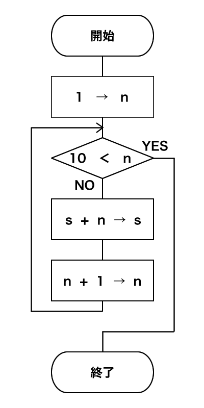 簡単なフローチャート